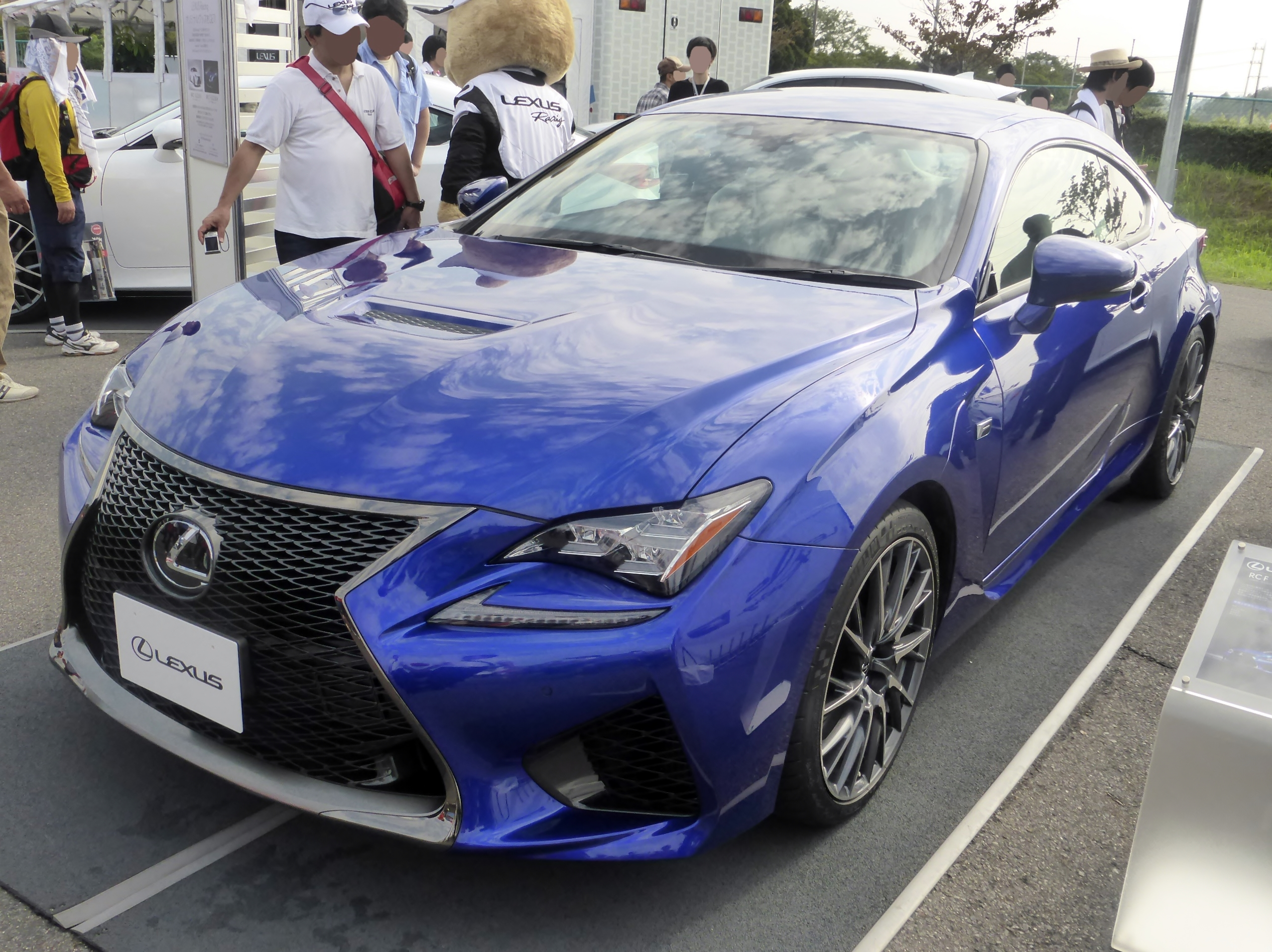 レクサス・RC Fをフロントから撮影。